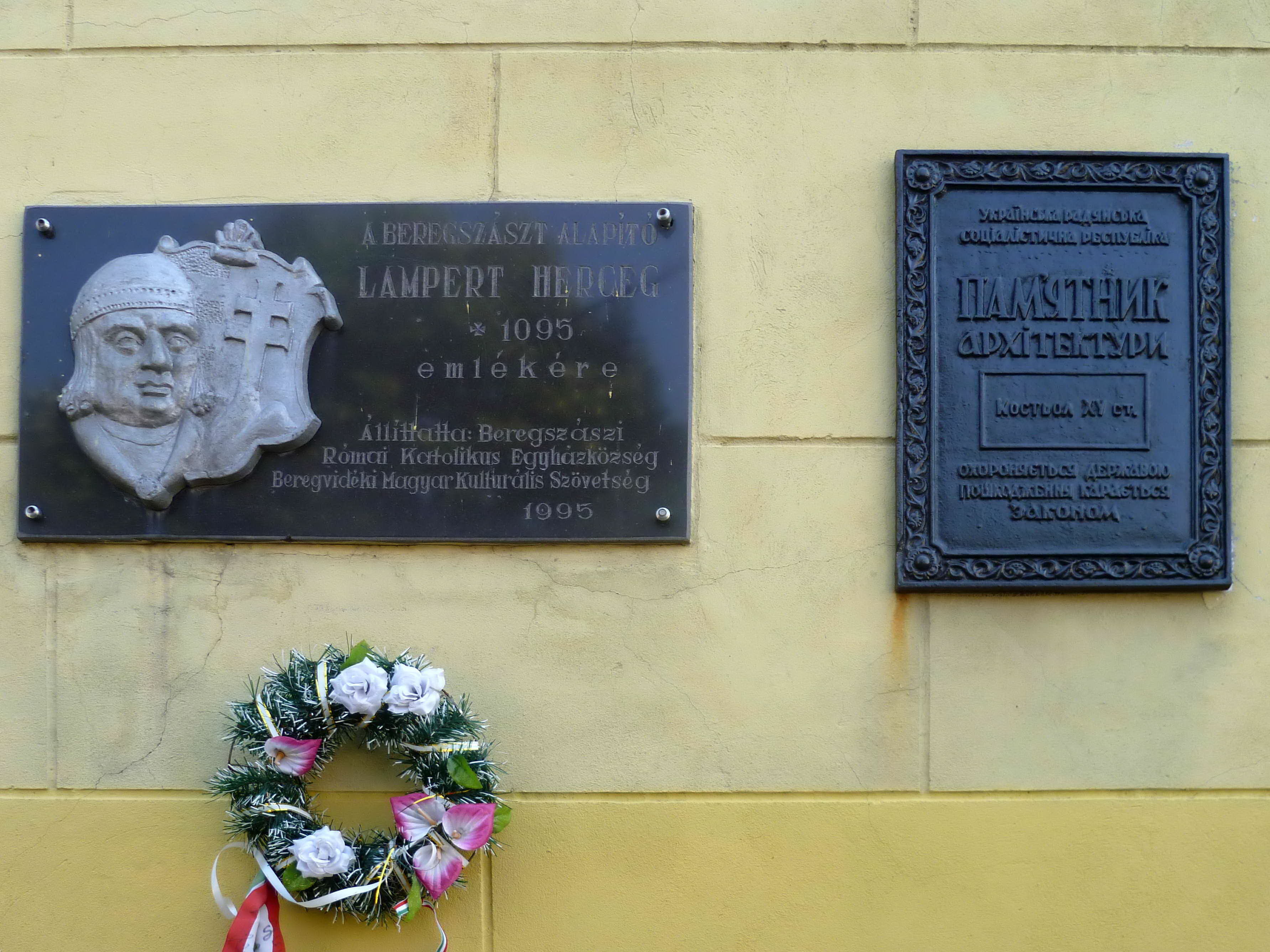 Костел Воздвиження Святого Хреста (13-15 ст.) - охоронна дошка - м.Берегове (пл. Ф. Ракоці II, 2) Закарпатська область Україна